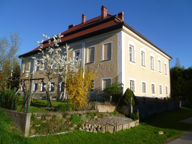 Schloss_Pfongau-Straßenansicht